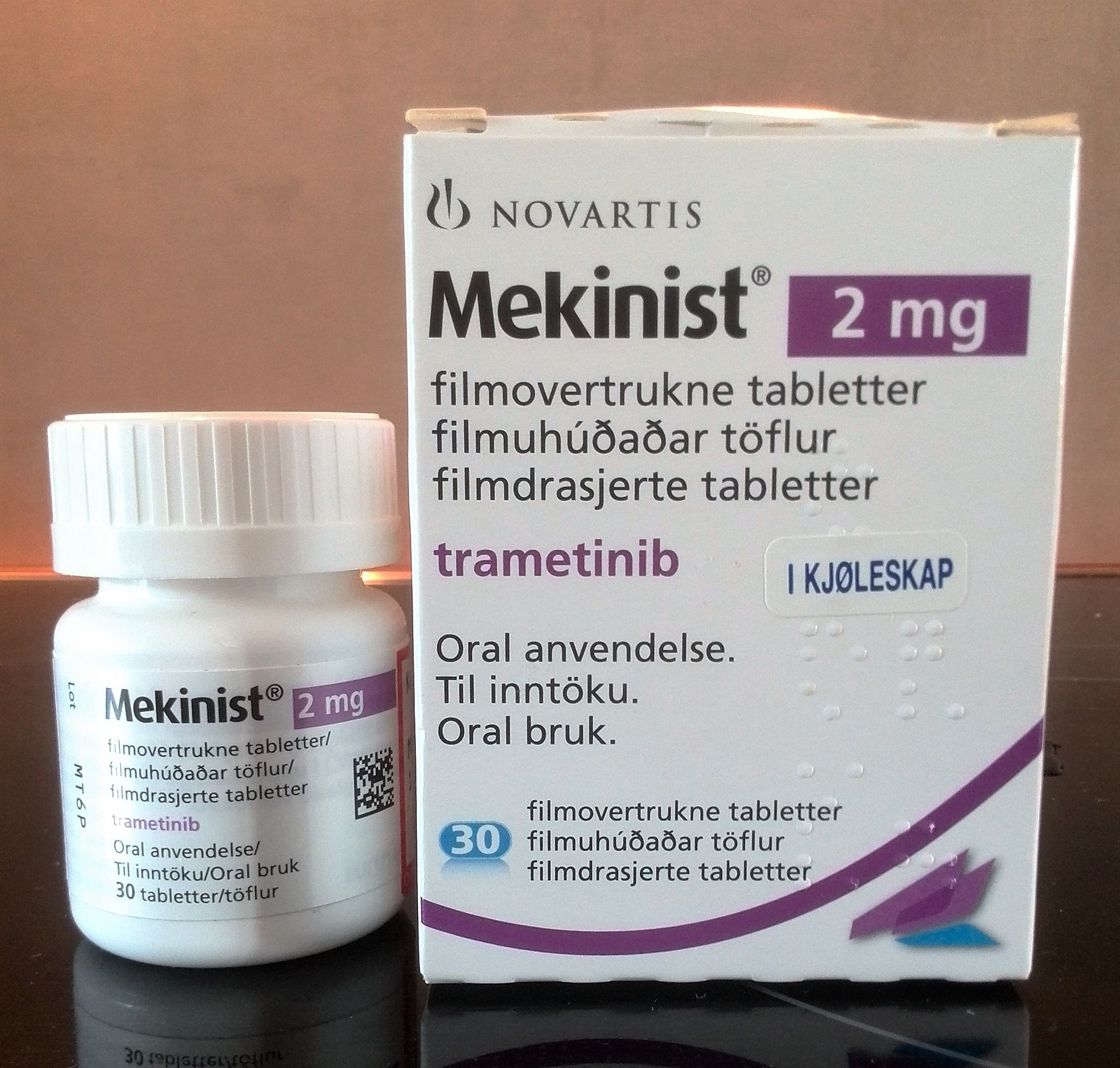 Trametinib er en kreftmedisin som selges under handelsnavnet Mekinist